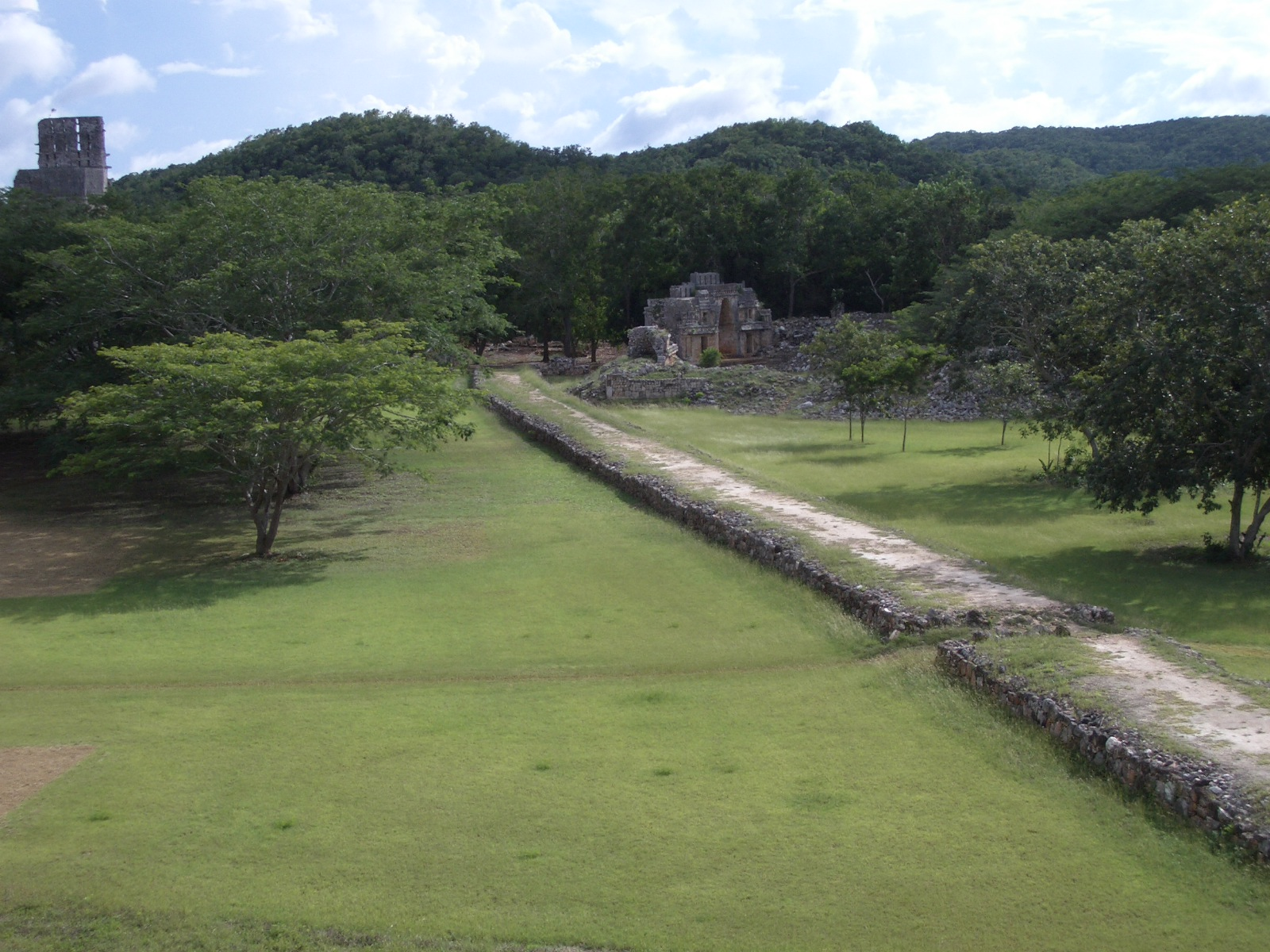 Tempel und Torbogen, Labná, Yucatán